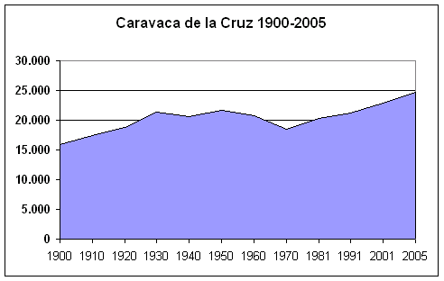 Evolución por decenios y 2005 Caravaca de la Cruz's population, Spain, (1900-2005).